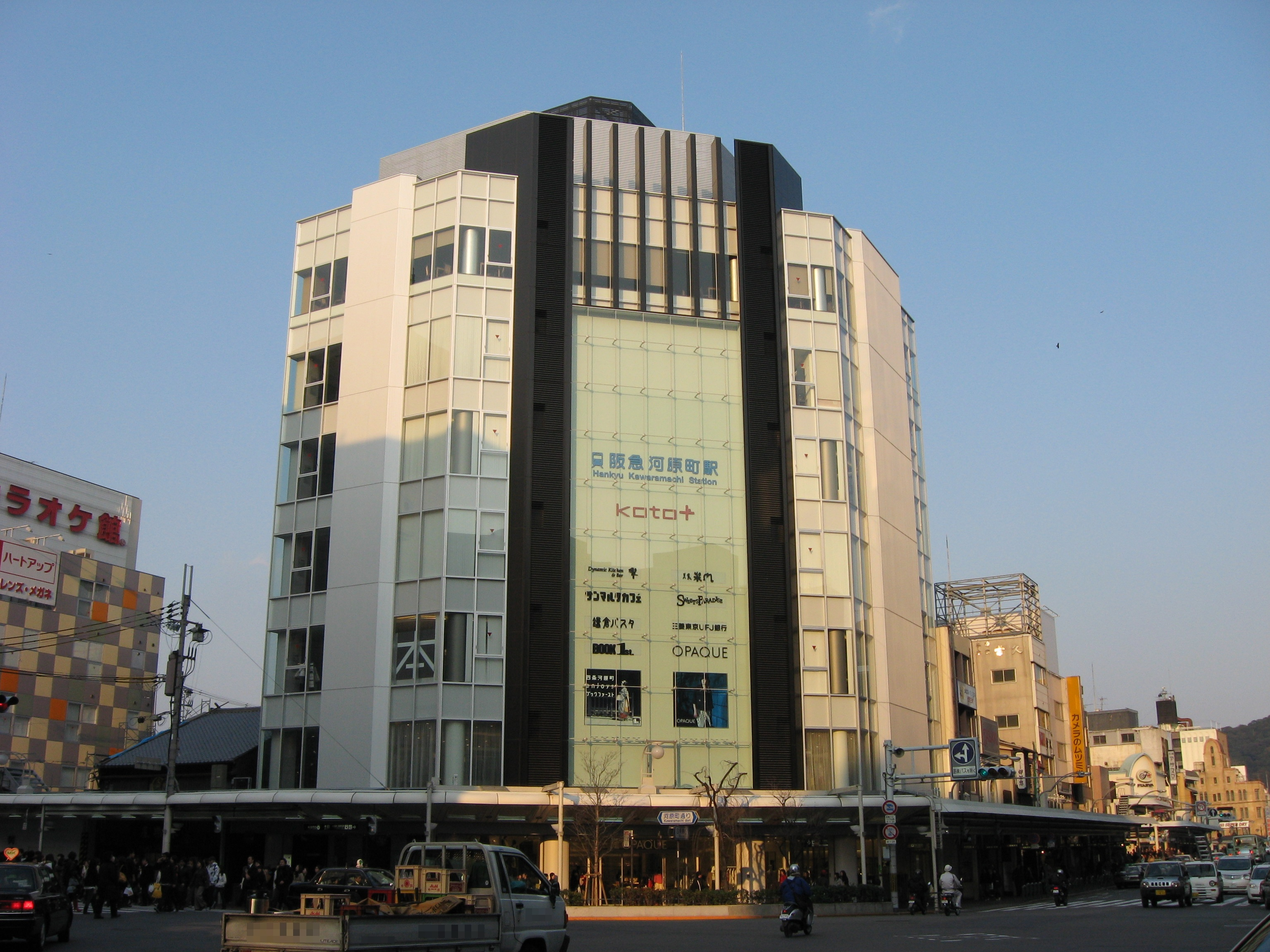 Kotocross Hankyu Kawaramachi, in Shijo Kawaramachi (jawp), Kyoto, Japan.